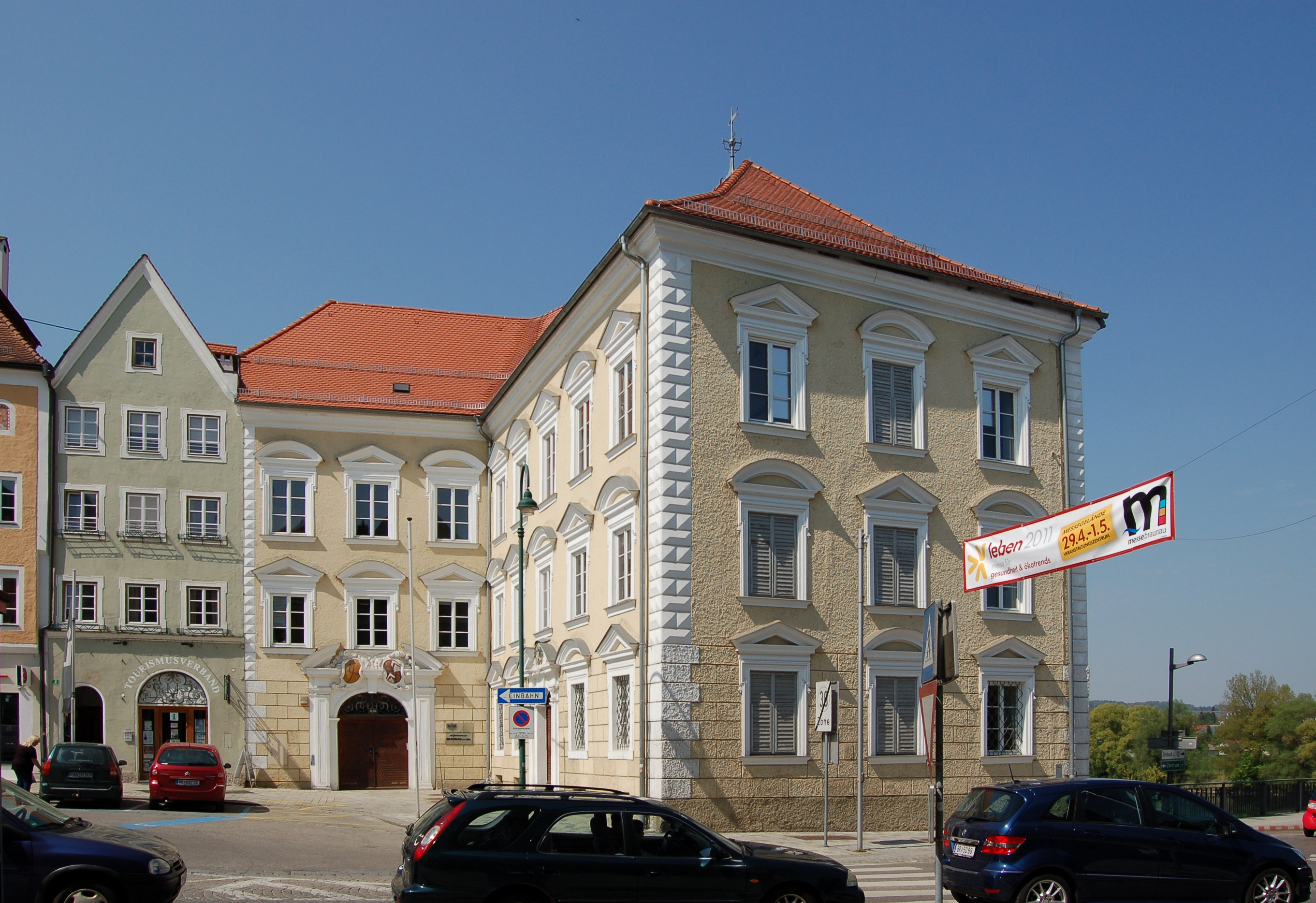 Das denkmalgeschützte Bezirksgericht am Stadtplatz 1 in Braunau am Inn. Links Nr. 2.